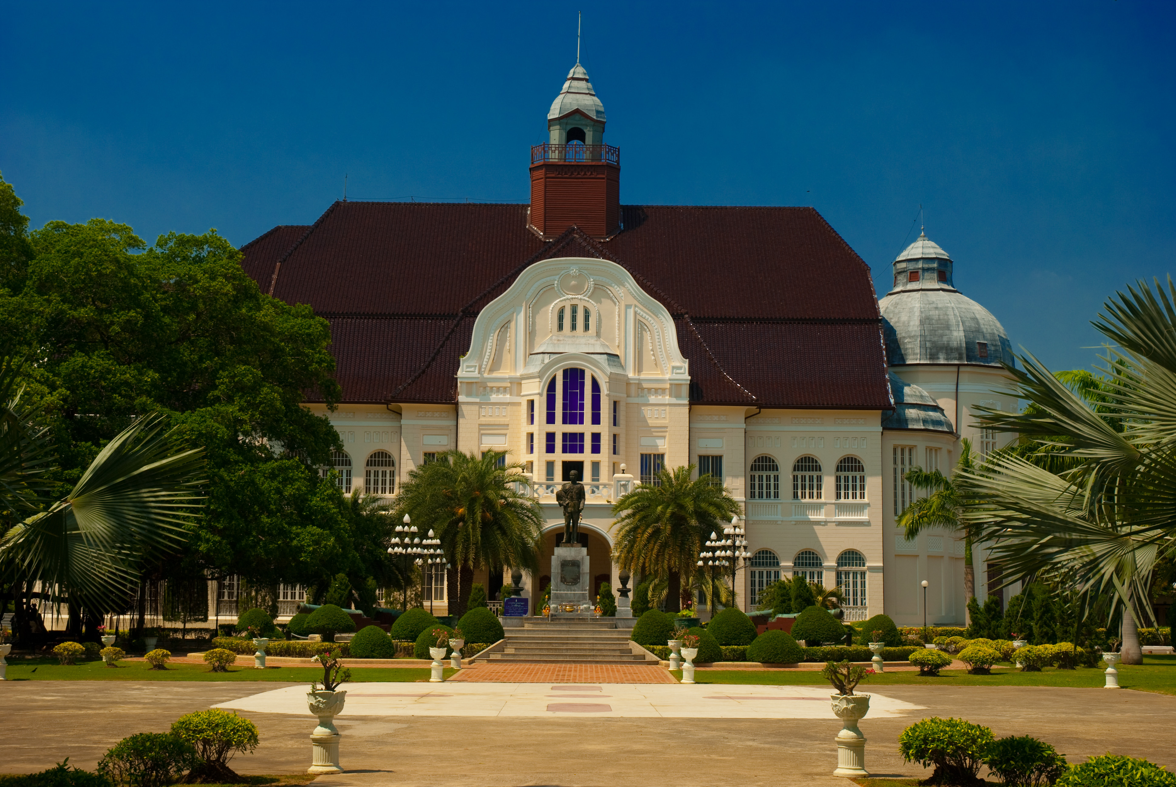 พระรามราชนิเวศน์